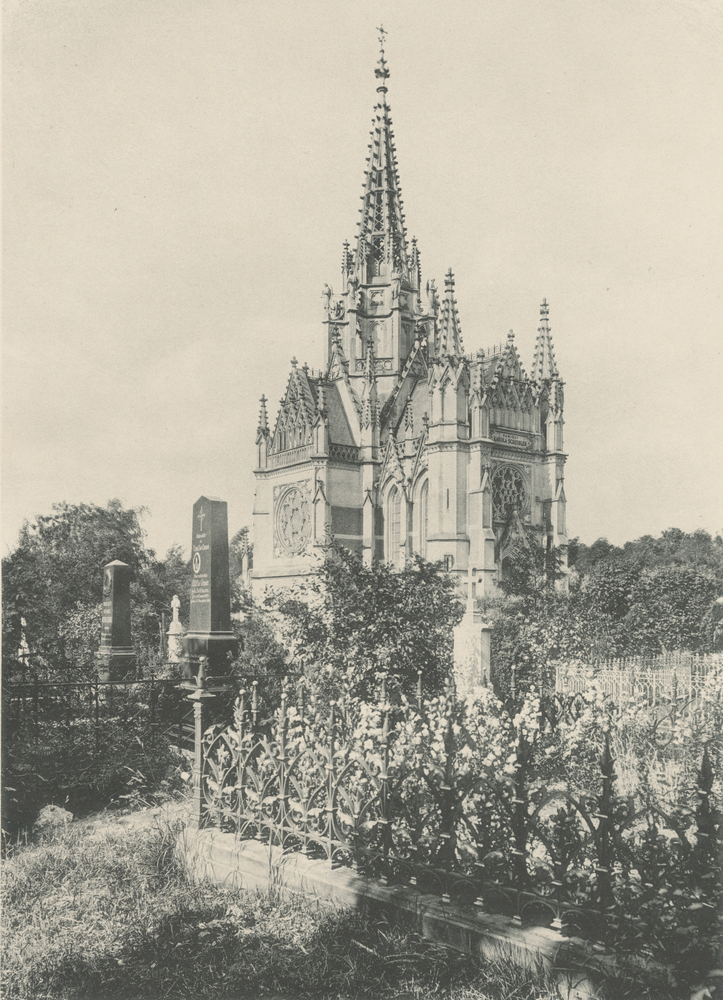 Fotografia przedstawia mauzoleum Karola Scheiblera na Starym Cmentarzu przy ulicy Ogrodowej. Karol Scheibler w latach 50. XIX wieku w ciągu kilku lat wybudował w Łodzi najnowocześniejszą fabrykę tekstylną ówczesnej Europy, stopniowo tworząc przemysłowe imperium. W momencie śmierci w 1881 roku jego majątek szacowano na kilkanaście milionów rubli. Dwa lata po jego pogrzebie architekt miasta Hilary Majewski, ogłosił w imieniu rodziny Scheiblerów konkurs na projekt grobowca. Znamienne jest, że w regulaminie konkursu wspomniano, iż: "nie oznacza się sumy kosztów, aby nie krępować myśli autora". Ponieważ żaden z nadesłanych projektów nie zadowolił rodziny, ogłoszono drugi, na którym również nie została wybrana żadna z 16 prac. Ostatecznie mauzoleum wykonano według projektu warszawskich architektów, Edwarda Lilpopa i Józefa Dziekońskiego. Kaplicę zbudowano czerpiąc z form niemieckiego i francuskiego gotyku. Fasada i wieża zostały wykonane z piaskowca, ściany boczne wypełniono żółtą cegłą klinkierową. Nad wejściem, przypominającym portal w średniowiecznej katedrze, znajduje się rozeta. Po II wojnie światowej wnętrze kaplicy zostało zdewastowane. W 2017 roku rozpoczęto remont obiektu. Fotografia pochodzi z wydanego w 1896 roku albumu Bronisława Wilkoszewskiego „Widoki m. Łodzi”. Saryusz Bronisław Paweł Wilkoszewski (1847-1901), zwany "łódzkim Canaletto" był mistrzem fotografii ilustracyjnej. Udokumentował zabudowę Łodzi z końca XIX wieku przede wszystkim wille, fabryki, budynki użyteczności publicznej, obiekty sakralne, ulicę Piotrkowską. Jego zakład fotograficzny znajdował się w willi "Trianon" w Pasażu Meyera 5 (obecnie ulica Moniuszki).